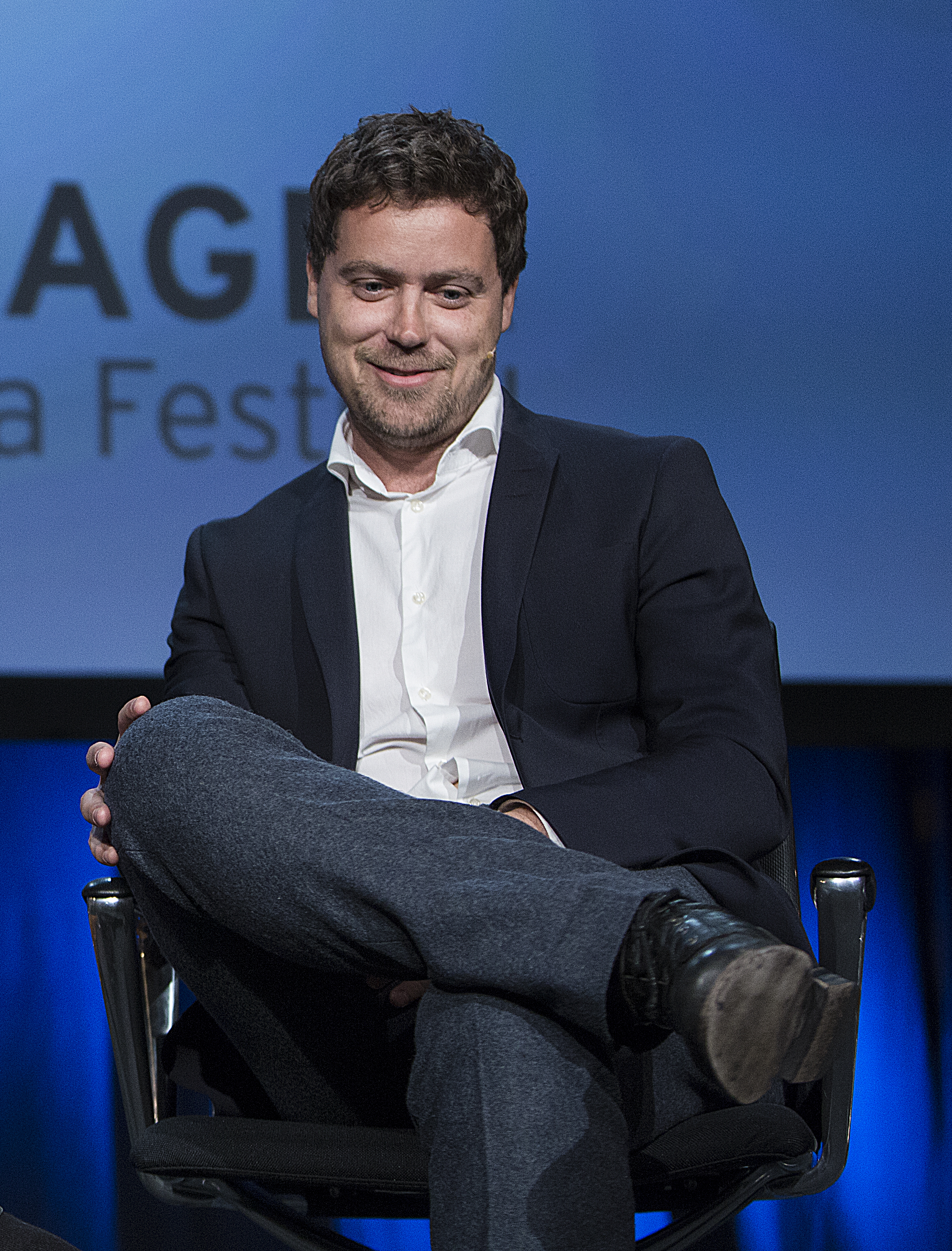 Medvirkende: Erlend Loe, Bjørn Olaf Johannessen, Greg Poehler, Per Schreiner Moderator: Mona B. Riise